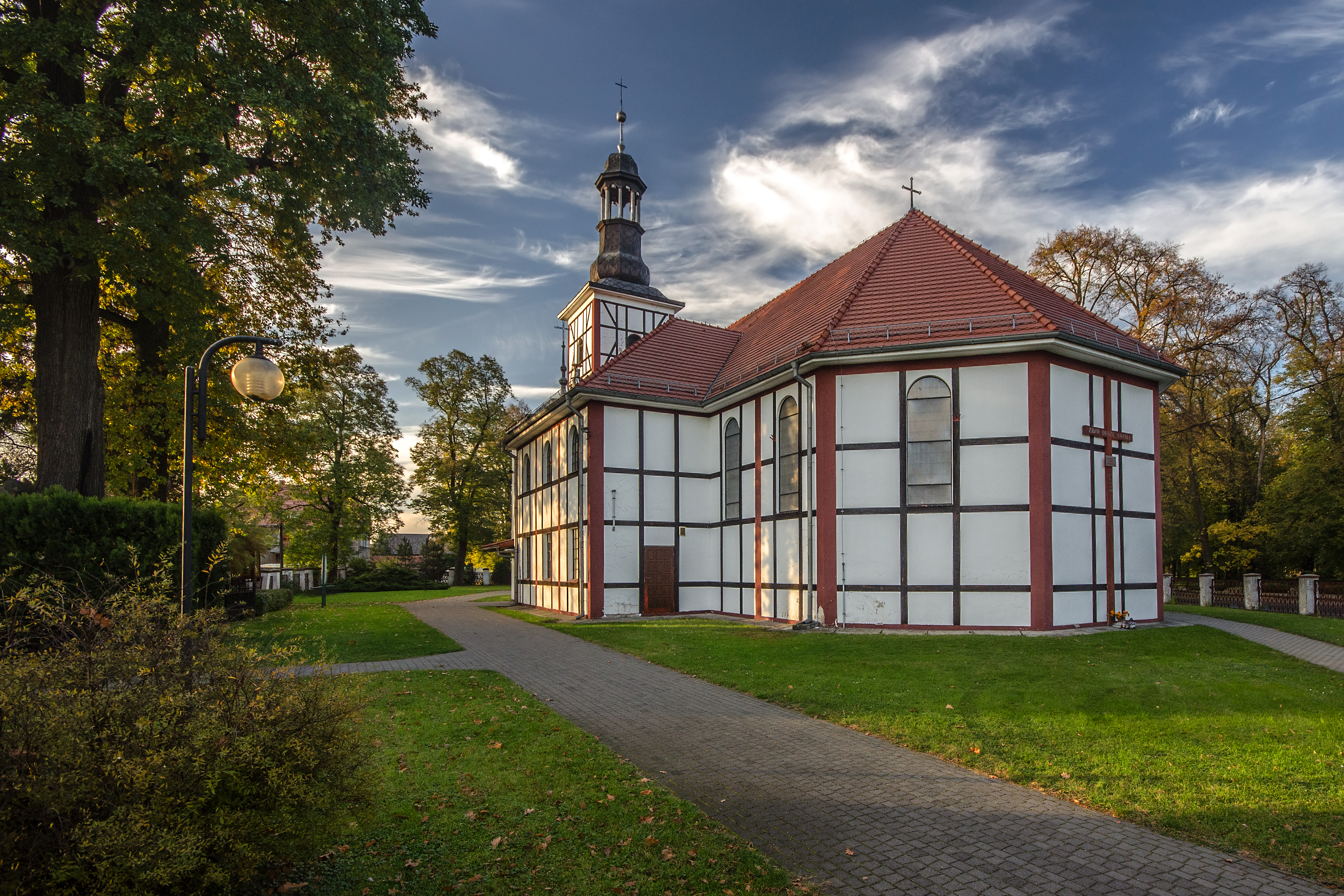 Jelcz-Laskowice, kościół par. p.w. św. Stanisława, XVII